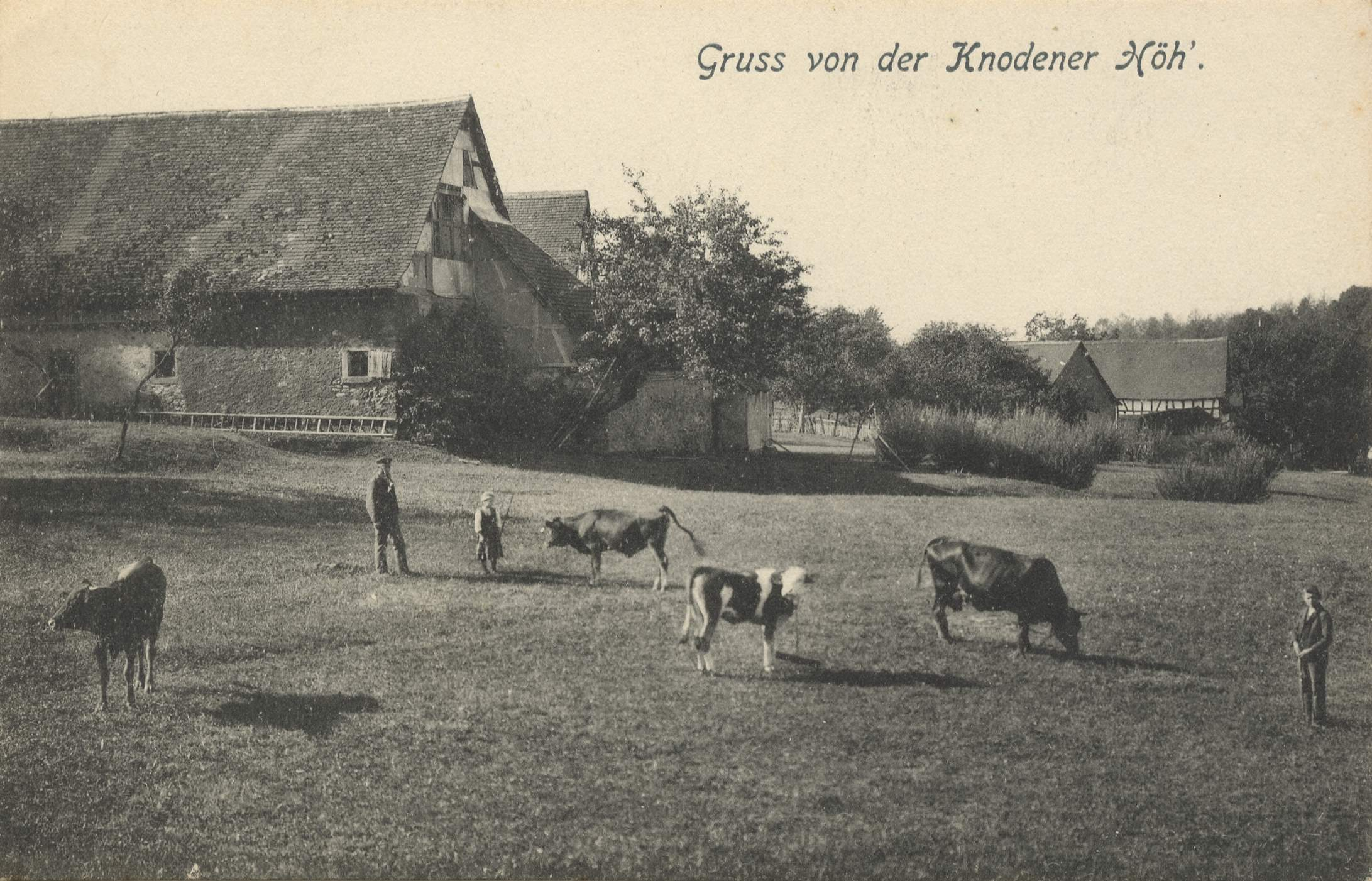 Bauerhof auf der Knodener Höh'